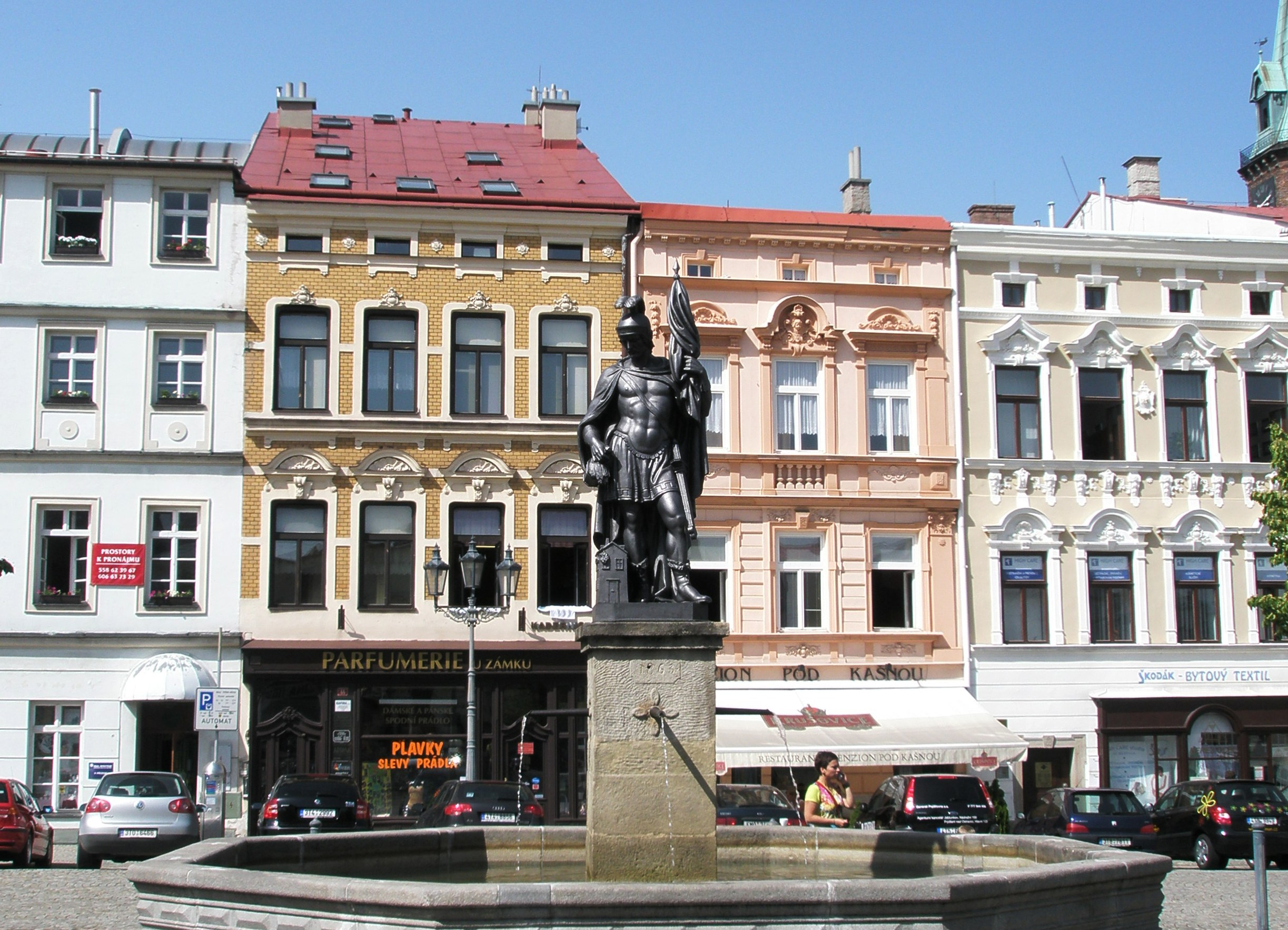 Frýdek, náměstí s kašnou se sochou sv. Floriána